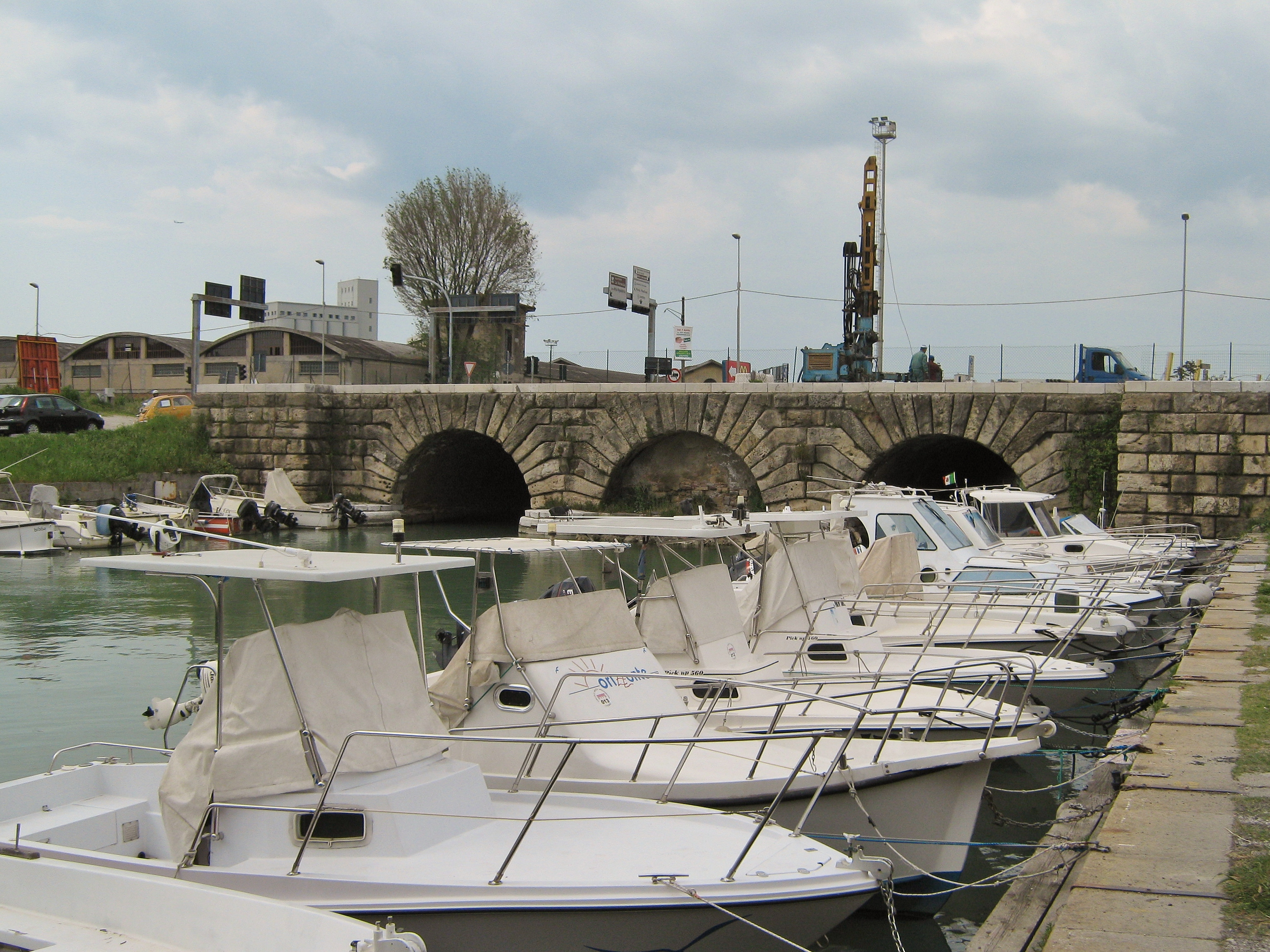 Livorno: ciò che resta della Dogana d'acqua, ovvero del grande edificio facente parte della cinta daziaria ottocentesca, oggetto di un radicale intervento di trasformazione durante il Ventennio e successivamente distrutto dai bombardamenti della seconda guerra mondiale. Il canale antistante, fino all'immediato dopoguerra, era parte di una darsena in cui sostavano i navicelli. La darsena oggi è interrata e la dogana è occupata da un incrocio stradale.